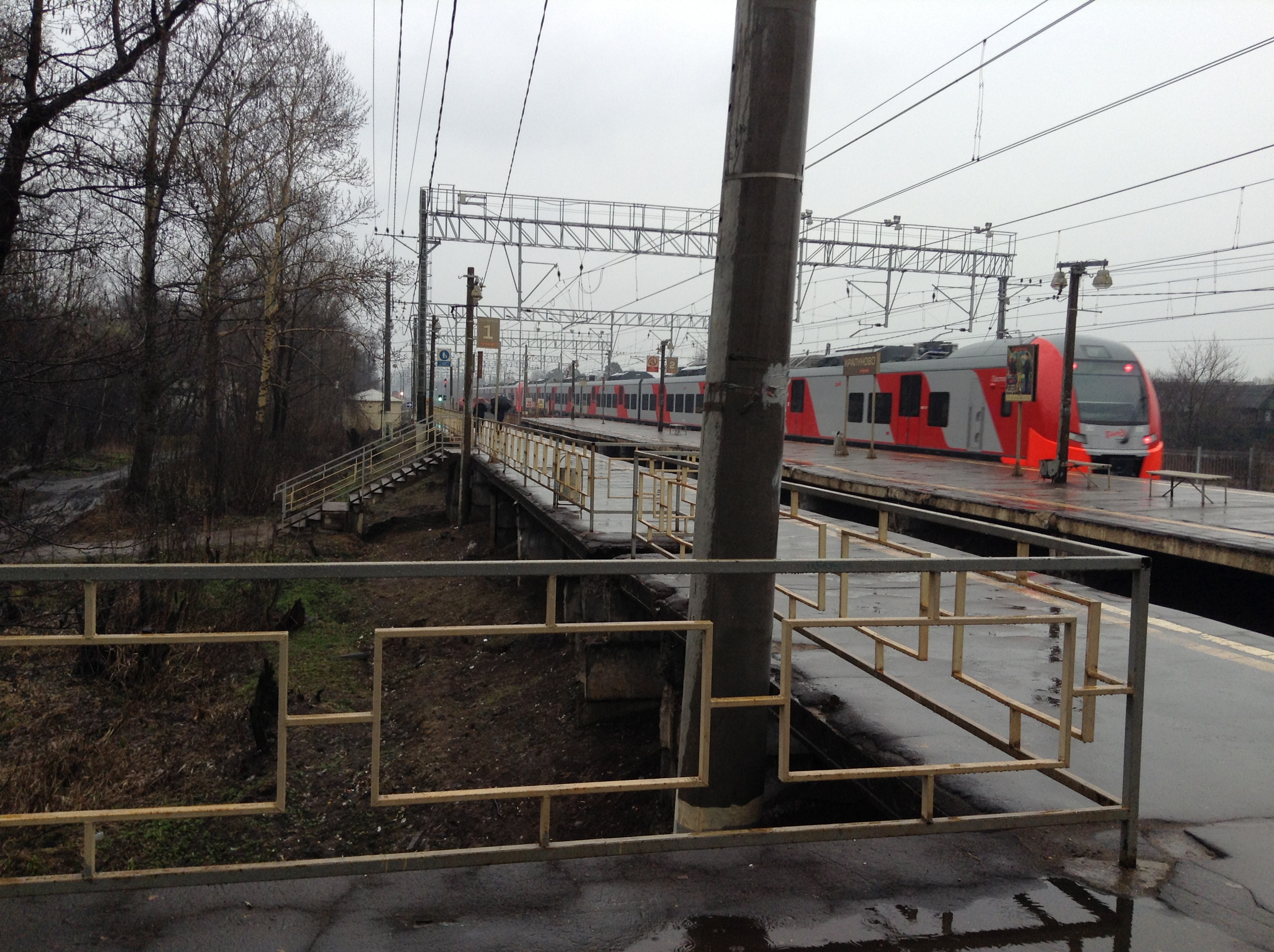 Электропоезд-экспресс ЭС1-012 Ласточка сообщением Москва - Нижний Новгород проследует станцию Храпуново без остановки.